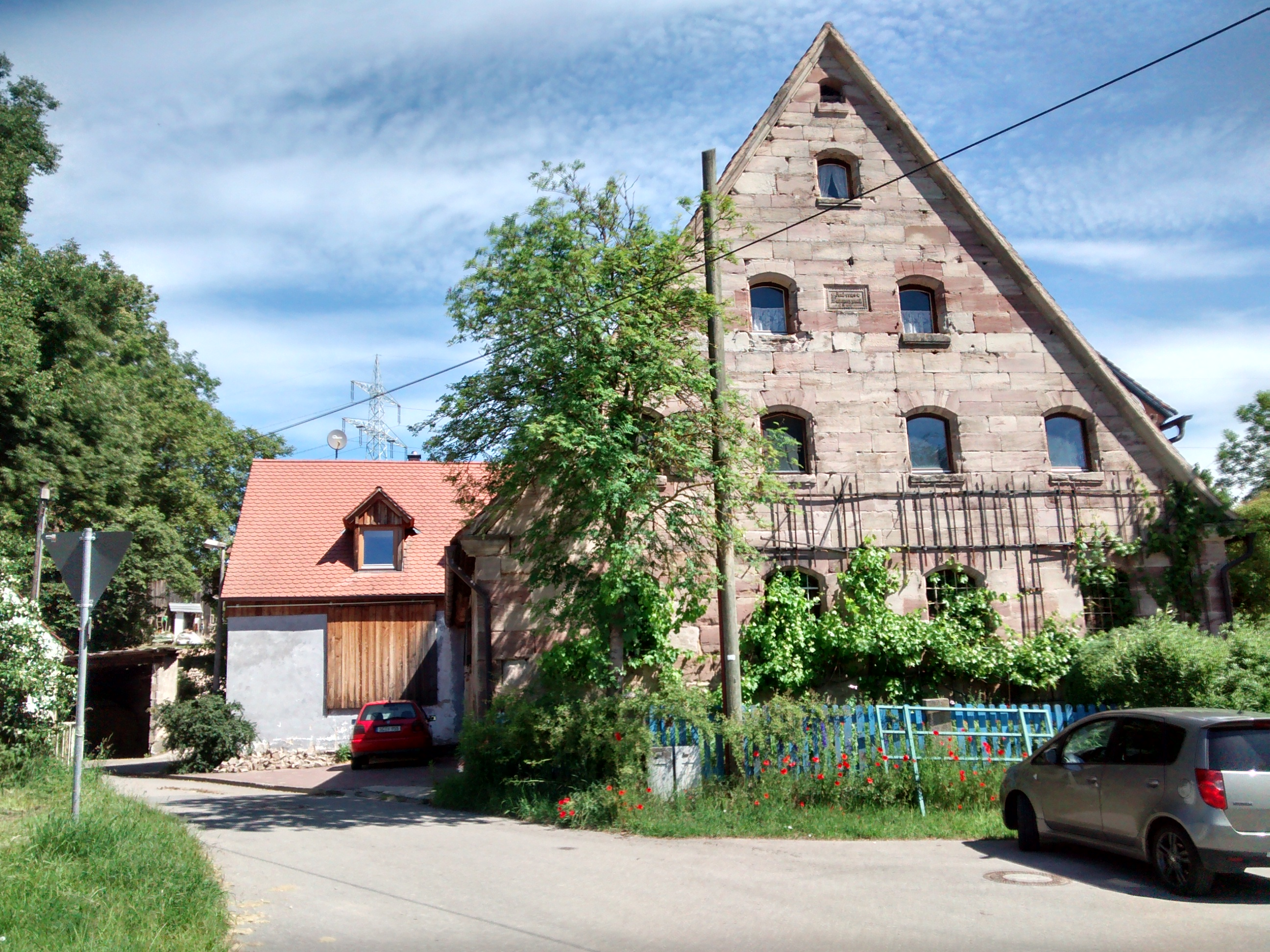 Denkmalgeschützter Bauernhof in Schwabach, Ortsteil Oberbaimbach, Nr. 3